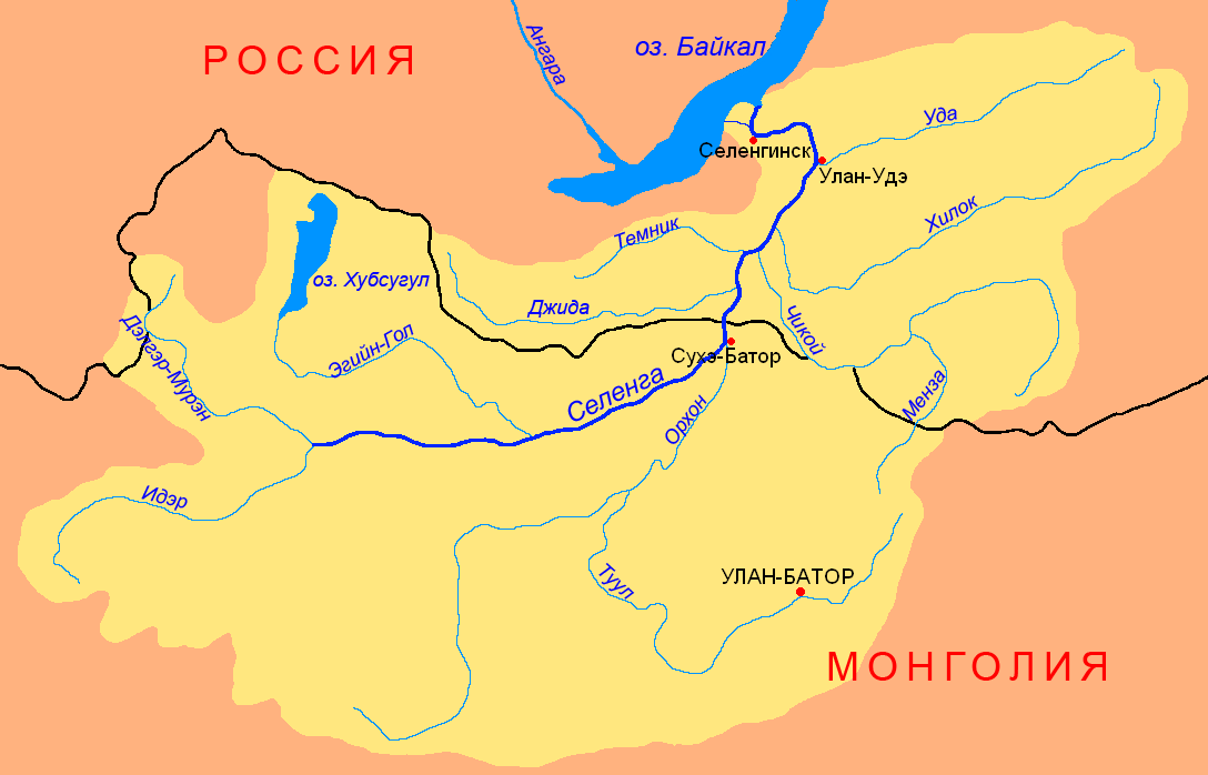 Схема бассейна реки Селенга